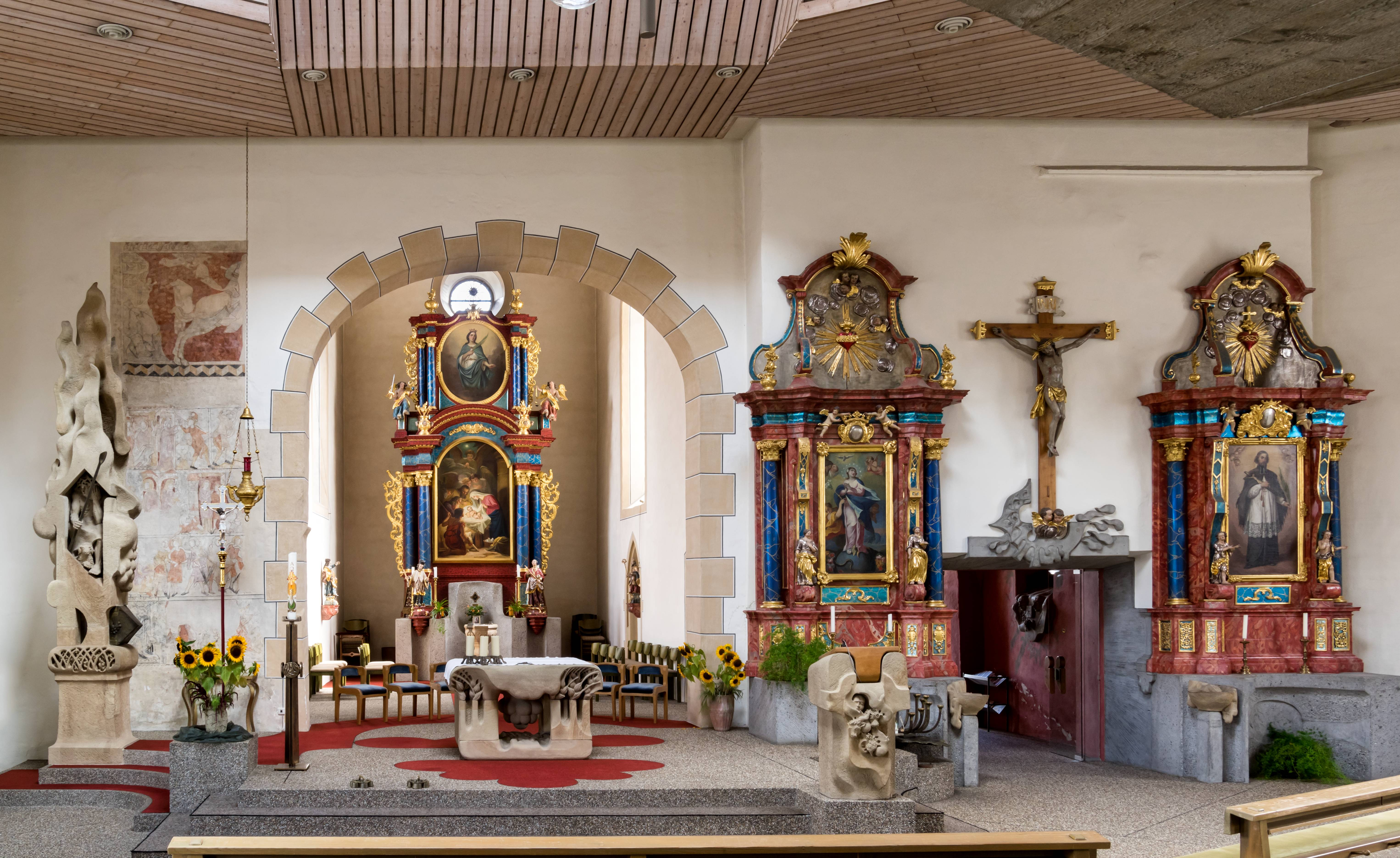 Bilder von St. Columba. in Pfaffenweiler Blick zum Chor und den Altären